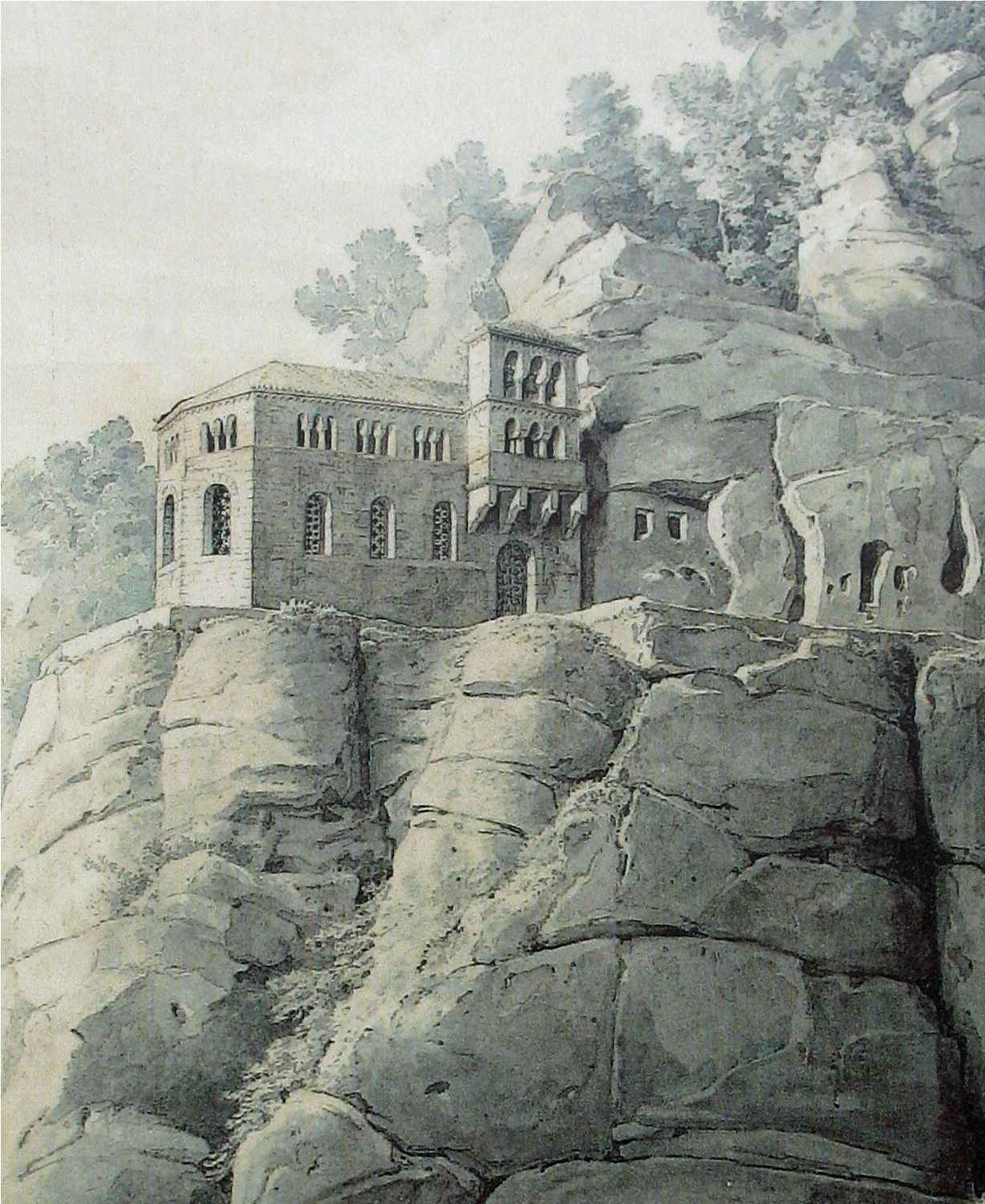 D'Grafkapell vum Jang de Blannen zu Kastel (Zeechnung mat Aquarell (ëm 1835) vum Karl Friedrich Schinkel,Architekt vun der Kapell)